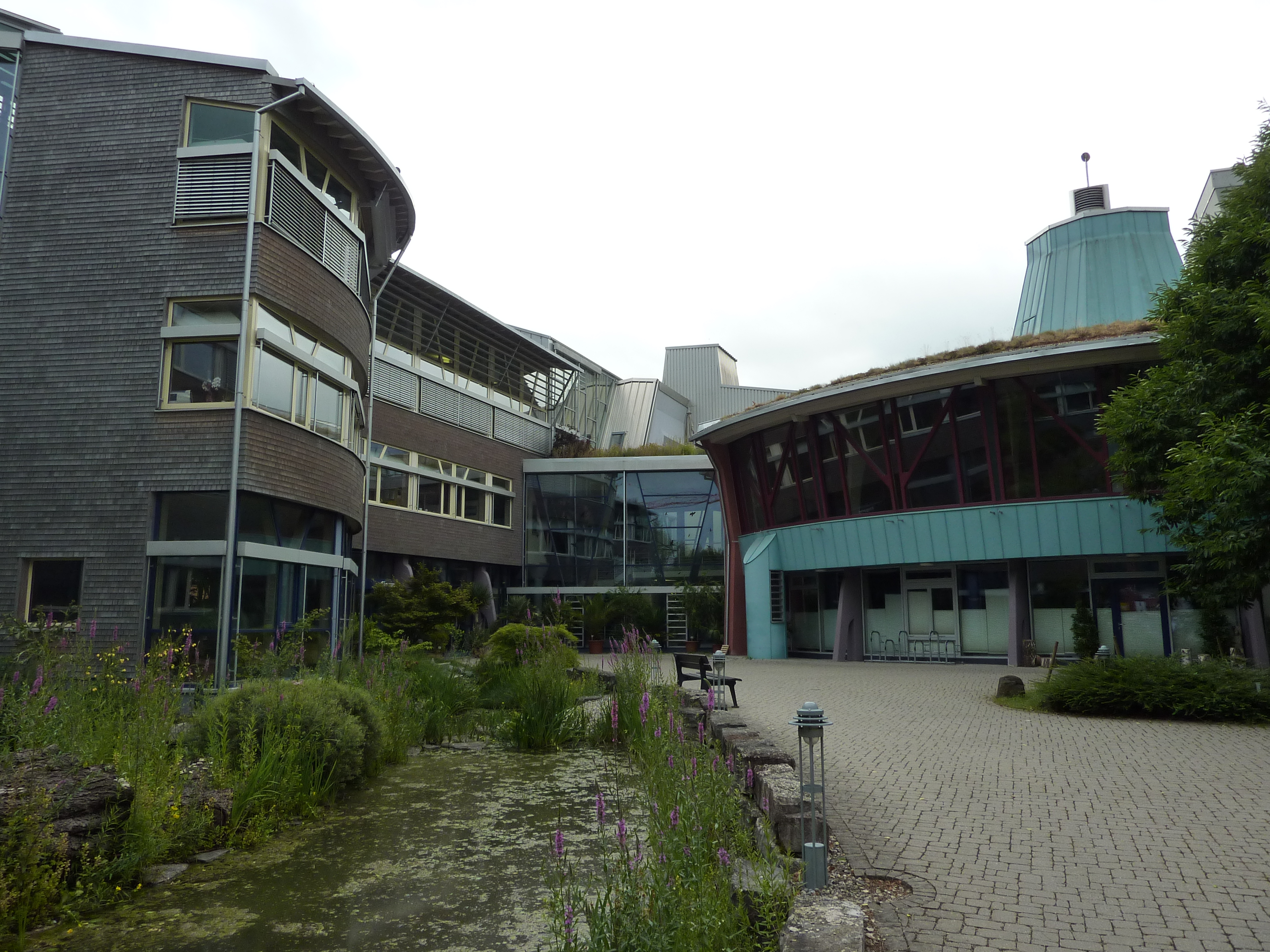 Weleda AG in Schwäbisch Gmünd